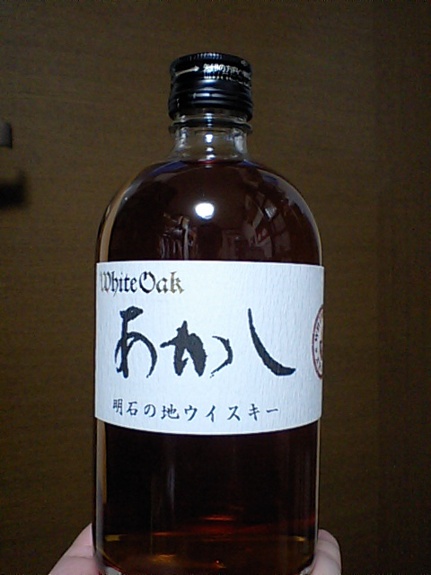 兵庫県明石市 江井ヶ島酒造「あかし」ウイスキー